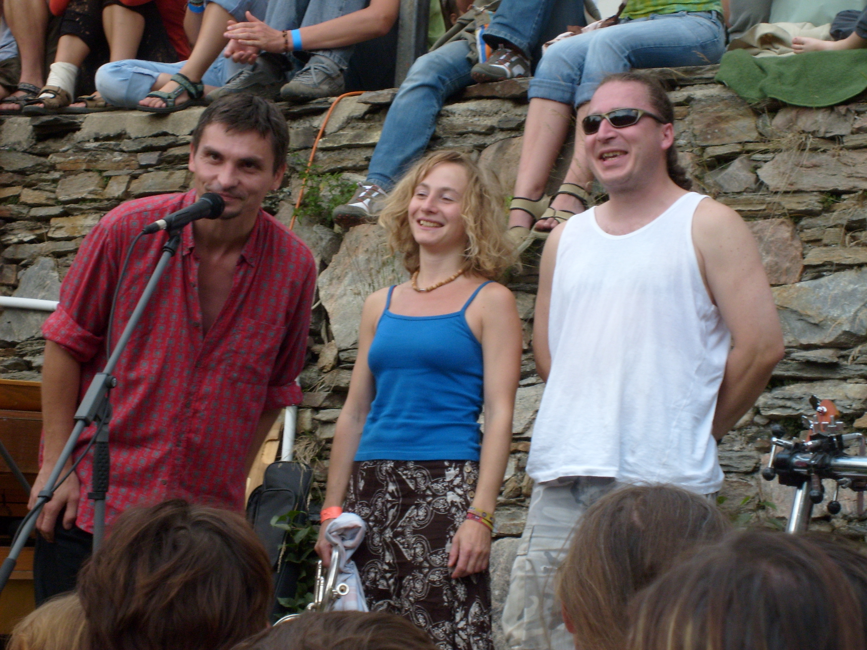 Traband, festival Otevřeno, Jimramov 2007